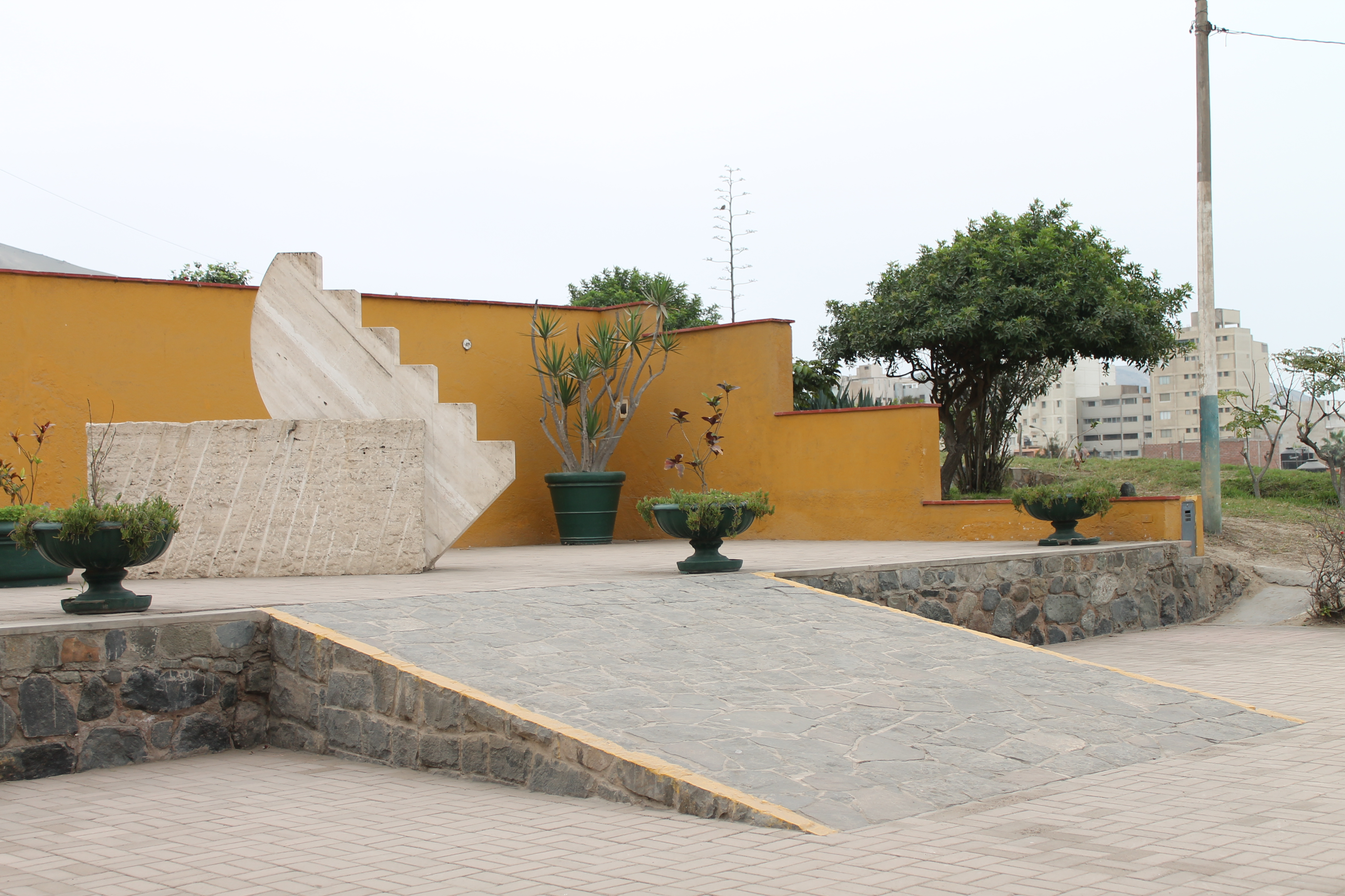 Ubicado en la entrada del Museo de Sitio de Ancón, donde anteriormente se reunían los arqueólogos tras realizar las excavaciones e investigaciones de la Necrópolis.